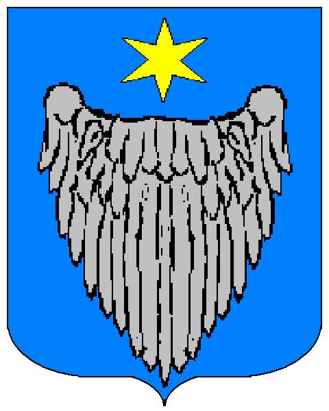 Grb obitelji Papalić